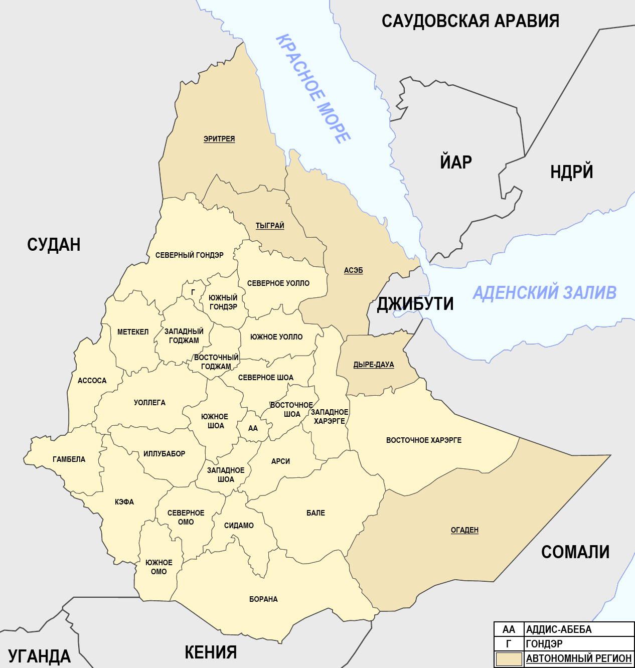 Карта административного деления Эфиопии в 1987-1991 гг.